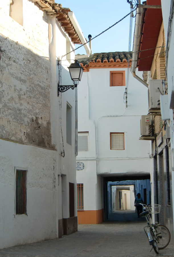 Gelsa, Ribera Baja del Ebro, Aragón. Calle de los Cubiertos